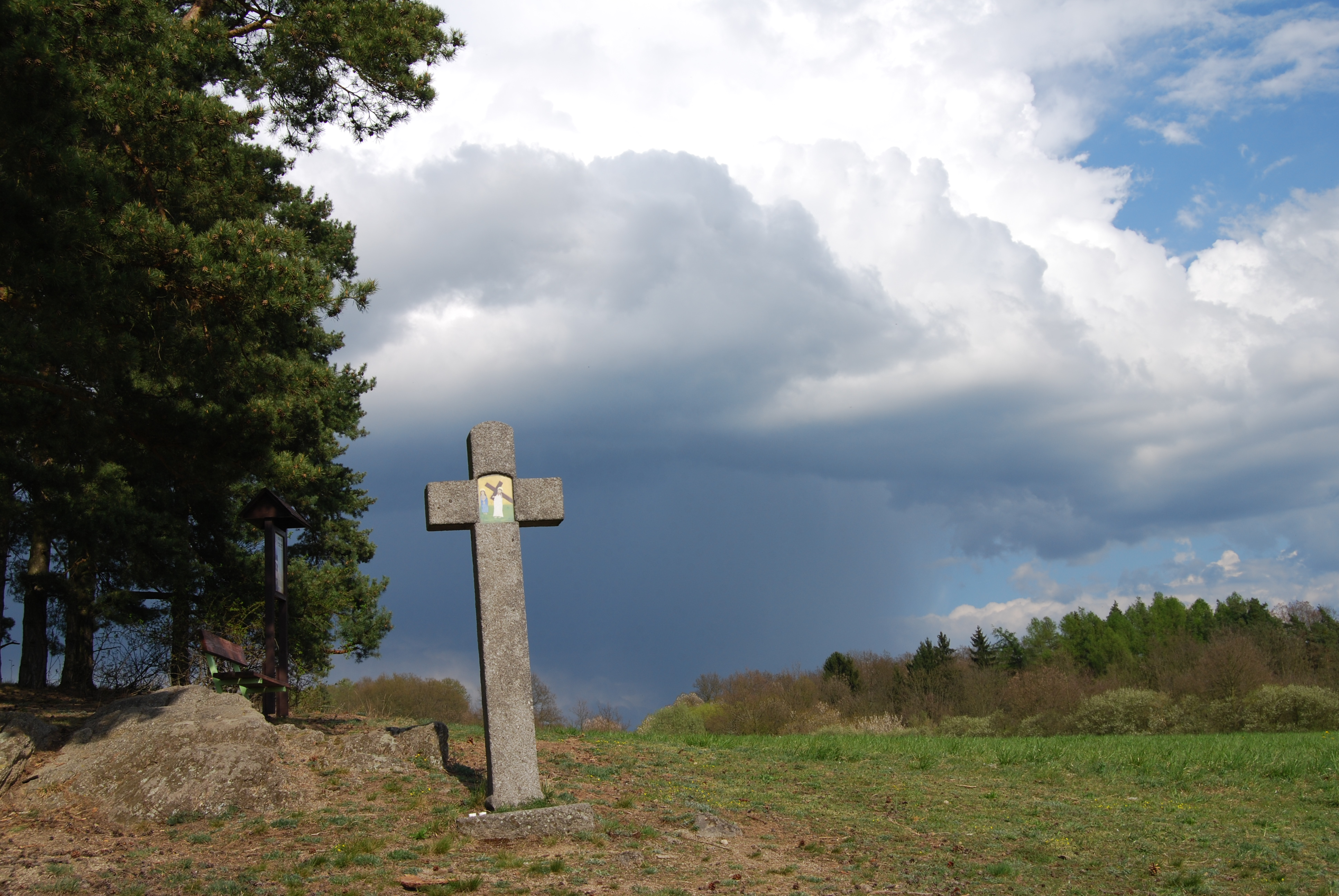 Jednotlivá zastavení křížové cesty. Jesenice (okres Příbram). Česká republika.